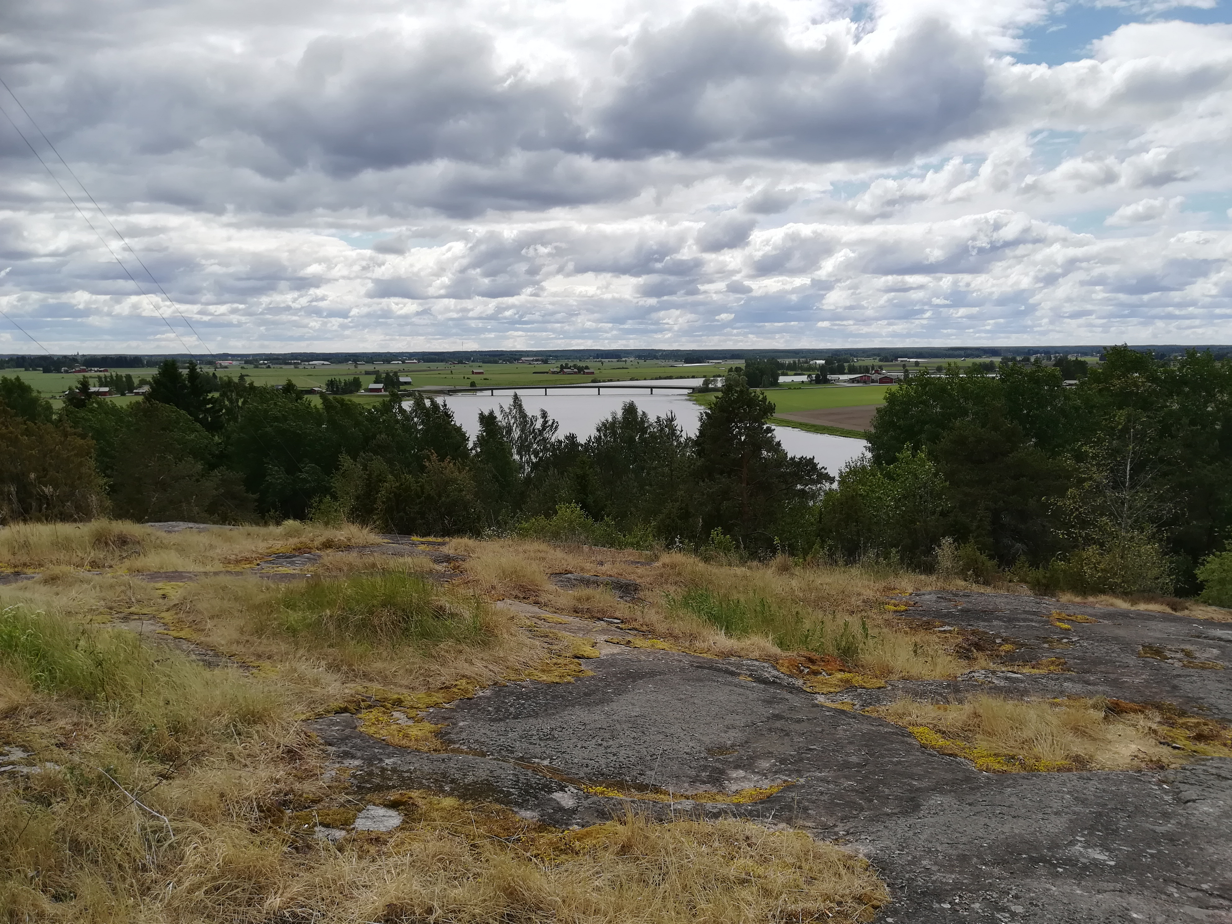 Huittisten Ripuvuori kesäkuussa 2018.